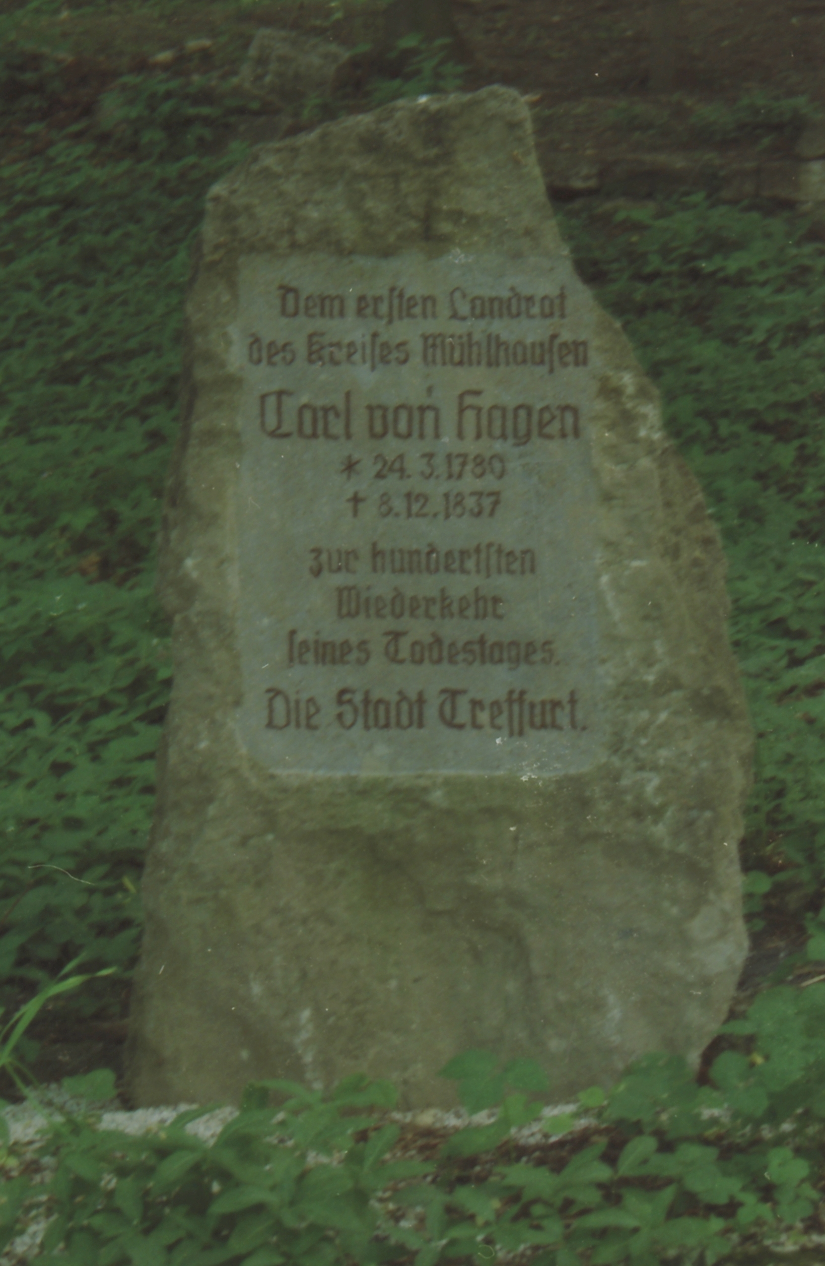 Treffurt, Stadtparkanlage Landratsberg. Dkm Carl von Hagen. Das Denkmal wurde 1937 errichtet.